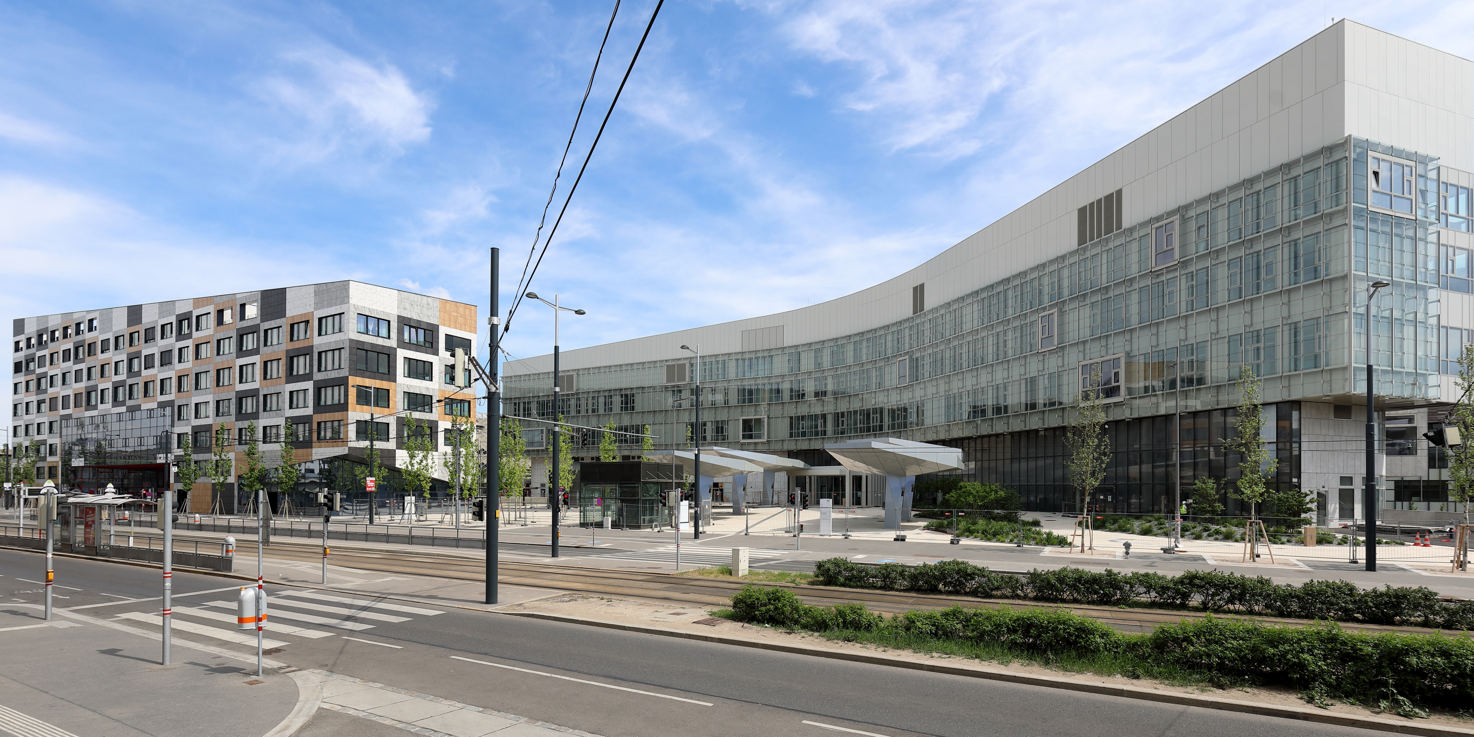 Westsüdwestansicht des Krankenhauses Nord im 21. Wiener Gemeindebezirk Floridsdorf.Die Bauarbeiten am zirka 110.000 m² großen Areal für das an der Brünner Straße gelegene 800-Betten-Spital begannen 2010 (Grundsteinlegung 2012). Ursprünglich war ein Vollbetrieb ab 2016 und Gesamtkosten von 825 Mio. Euro geplant. Aktuell ist ein Teilbetrieb ab Ende 2018 geplant und man rechnet mit Kosten von 1,5 Mrd. aufwärts.